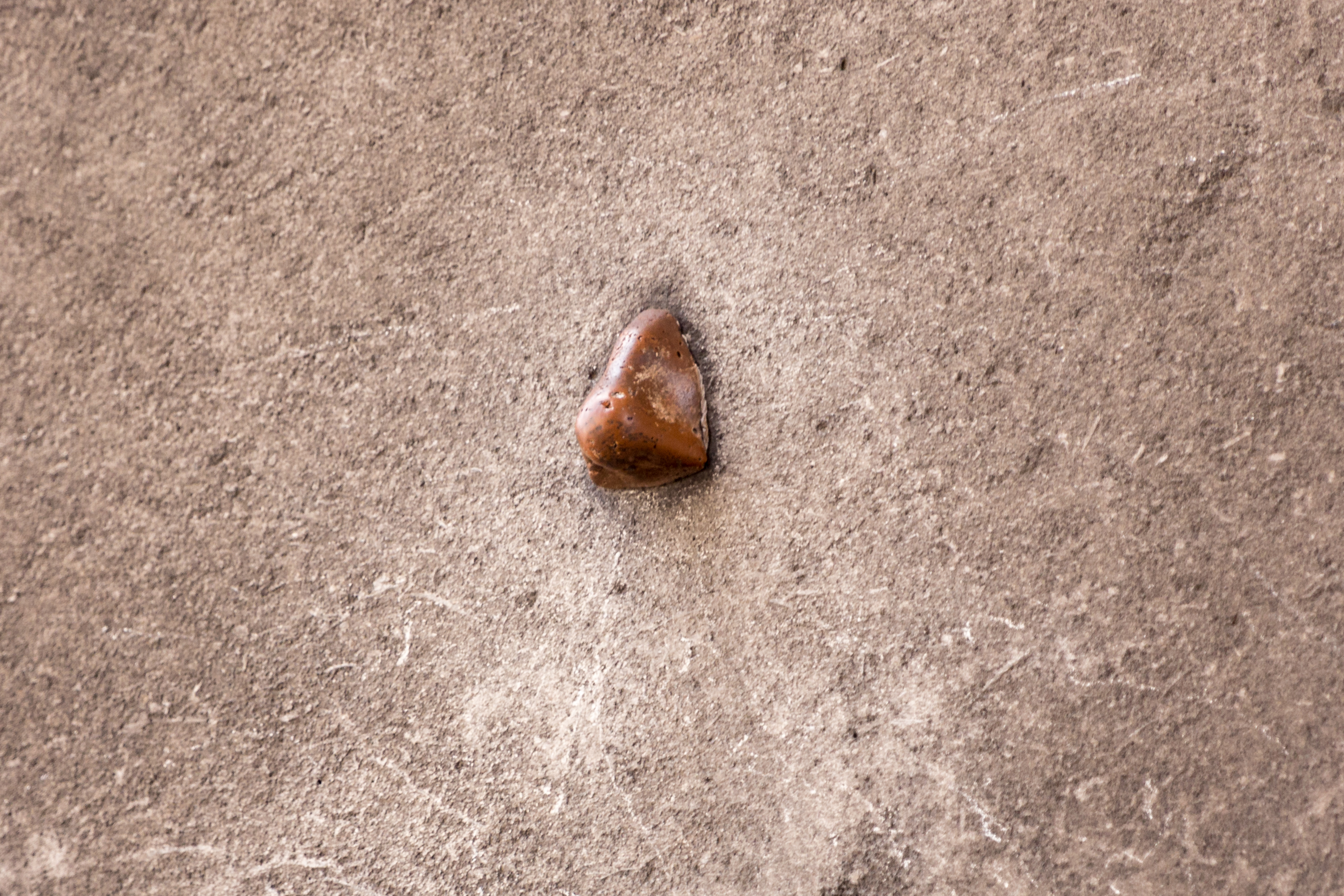 Naríz en una columna del Admiralty Arch, Londres.